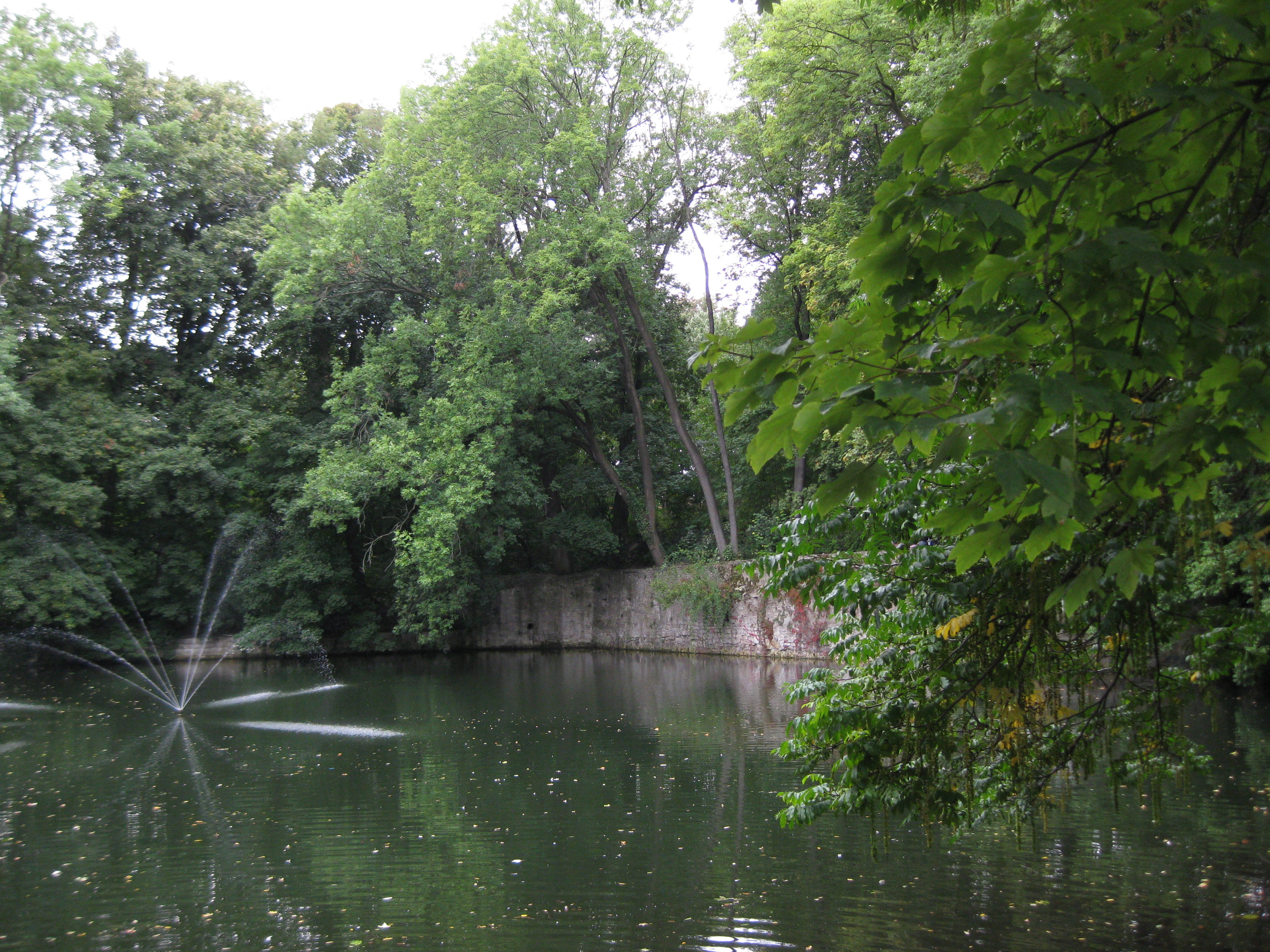 Neben dem Cheltenhampark ist ein Teil des Wassergrabens mit der Mauer der Wallbefestigung erhalten.